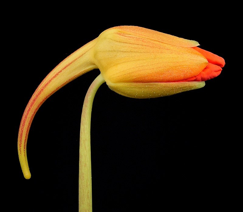 Tropaeolum majus